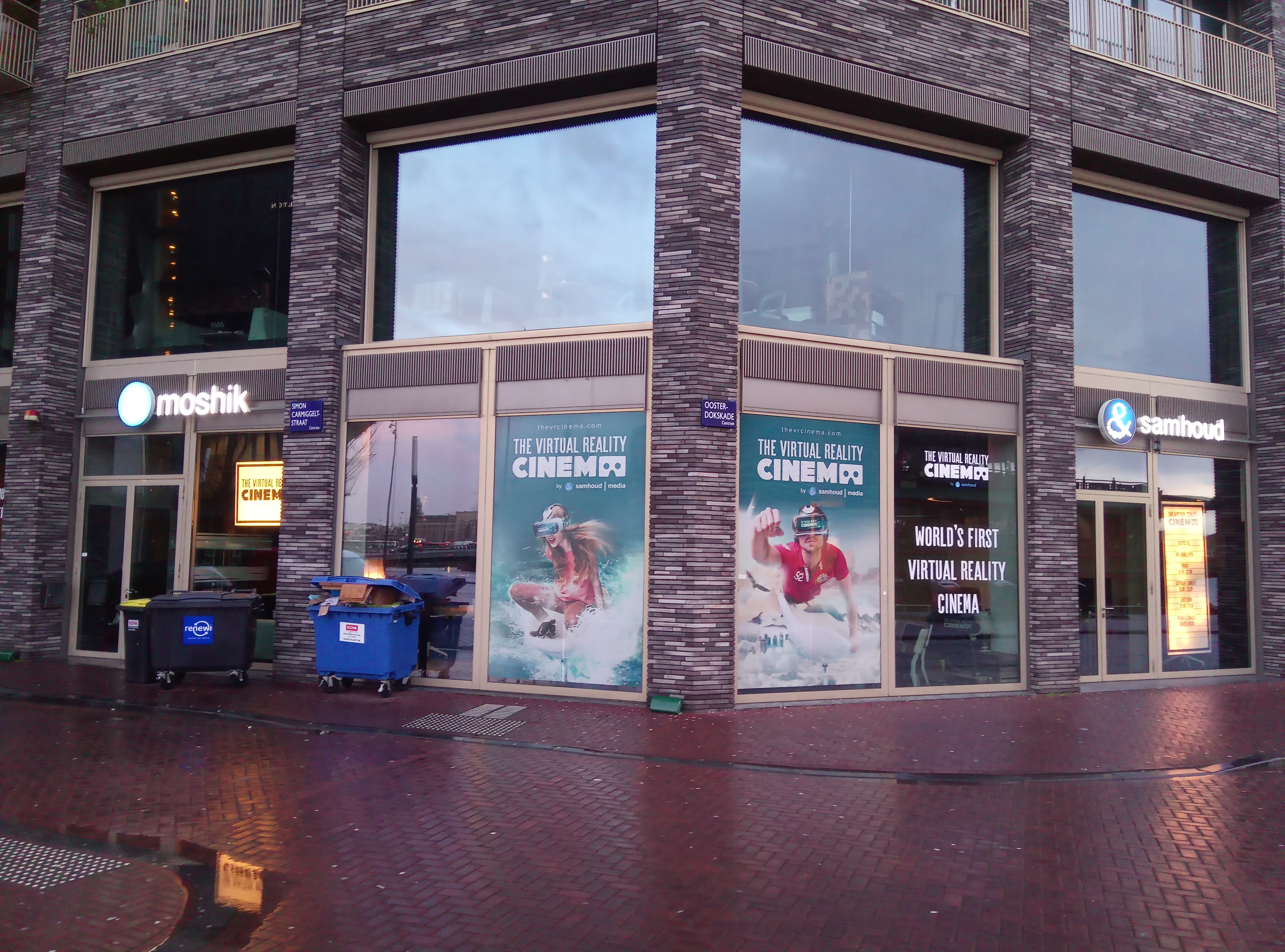 Samhoud Places, Moshik in Amsterdam